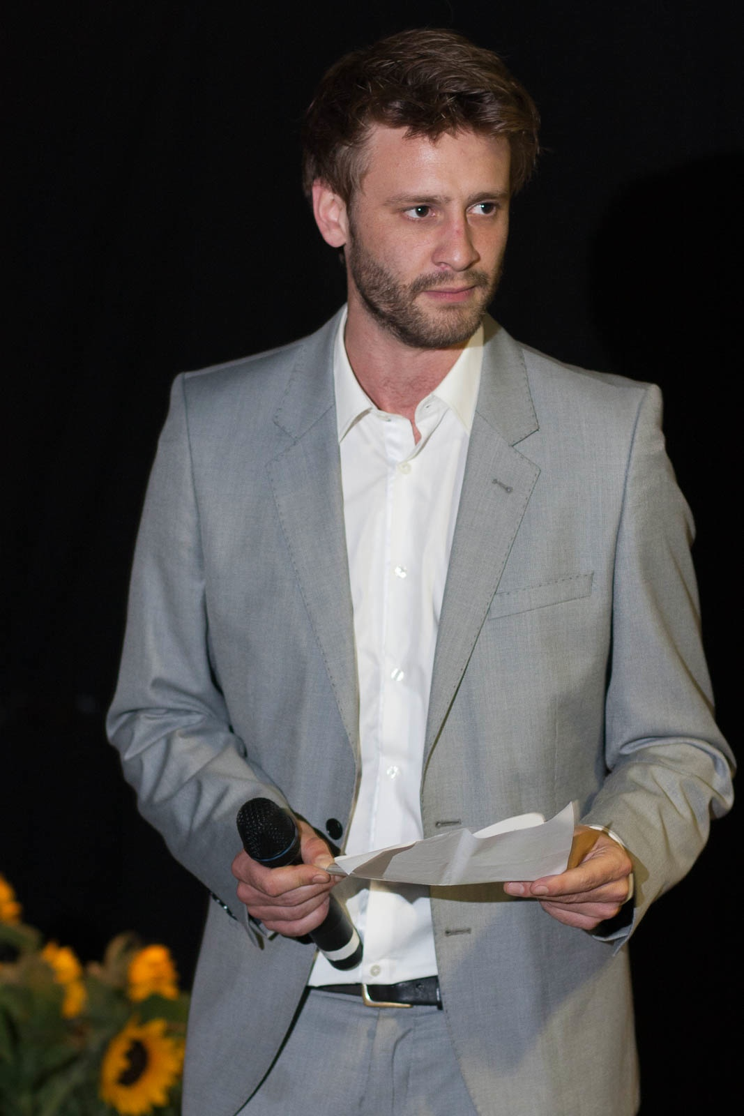 2014 in Düsseldorf